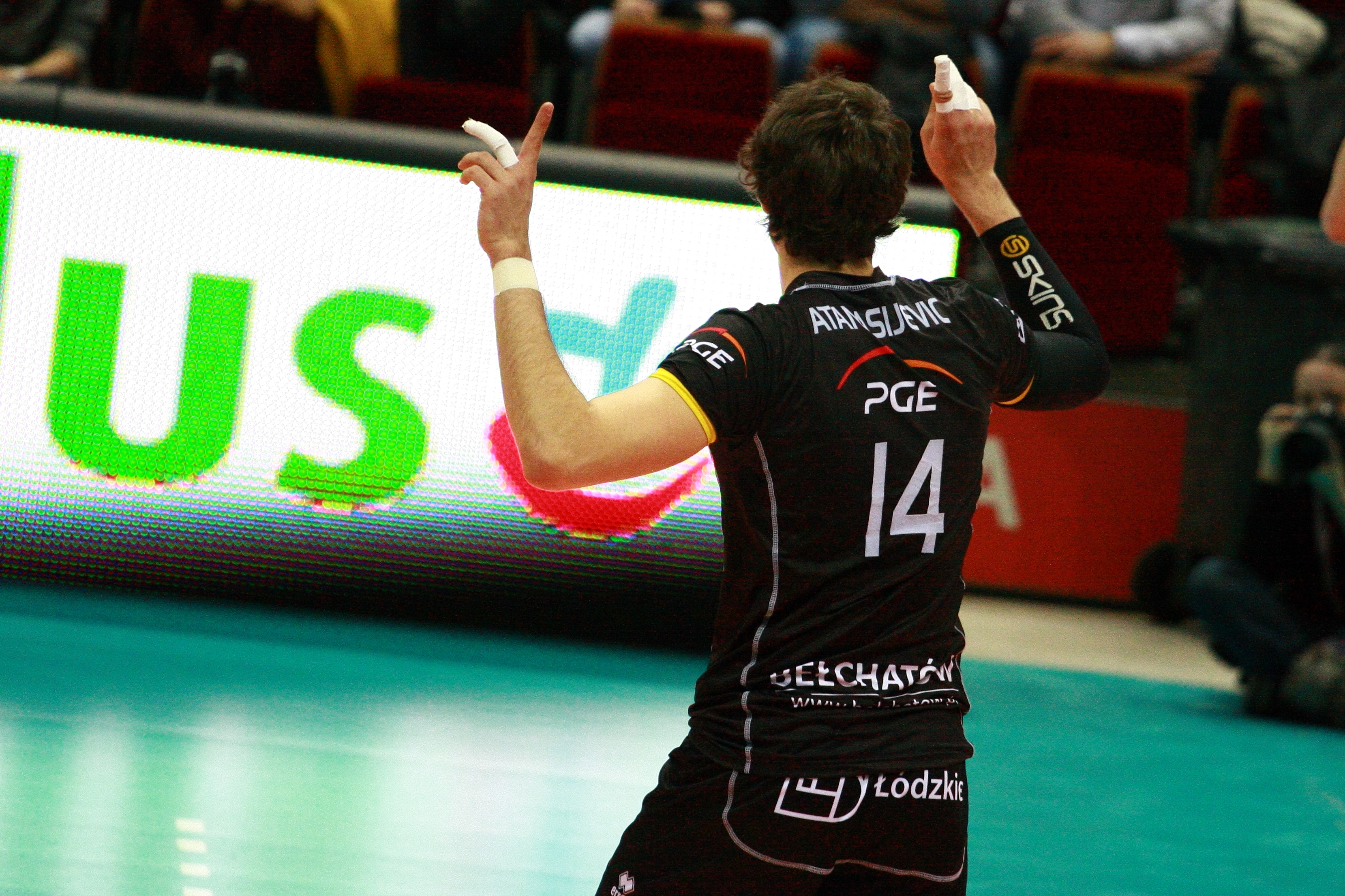 Lotos Trefl Gdańsk vs Skra Bełchatów